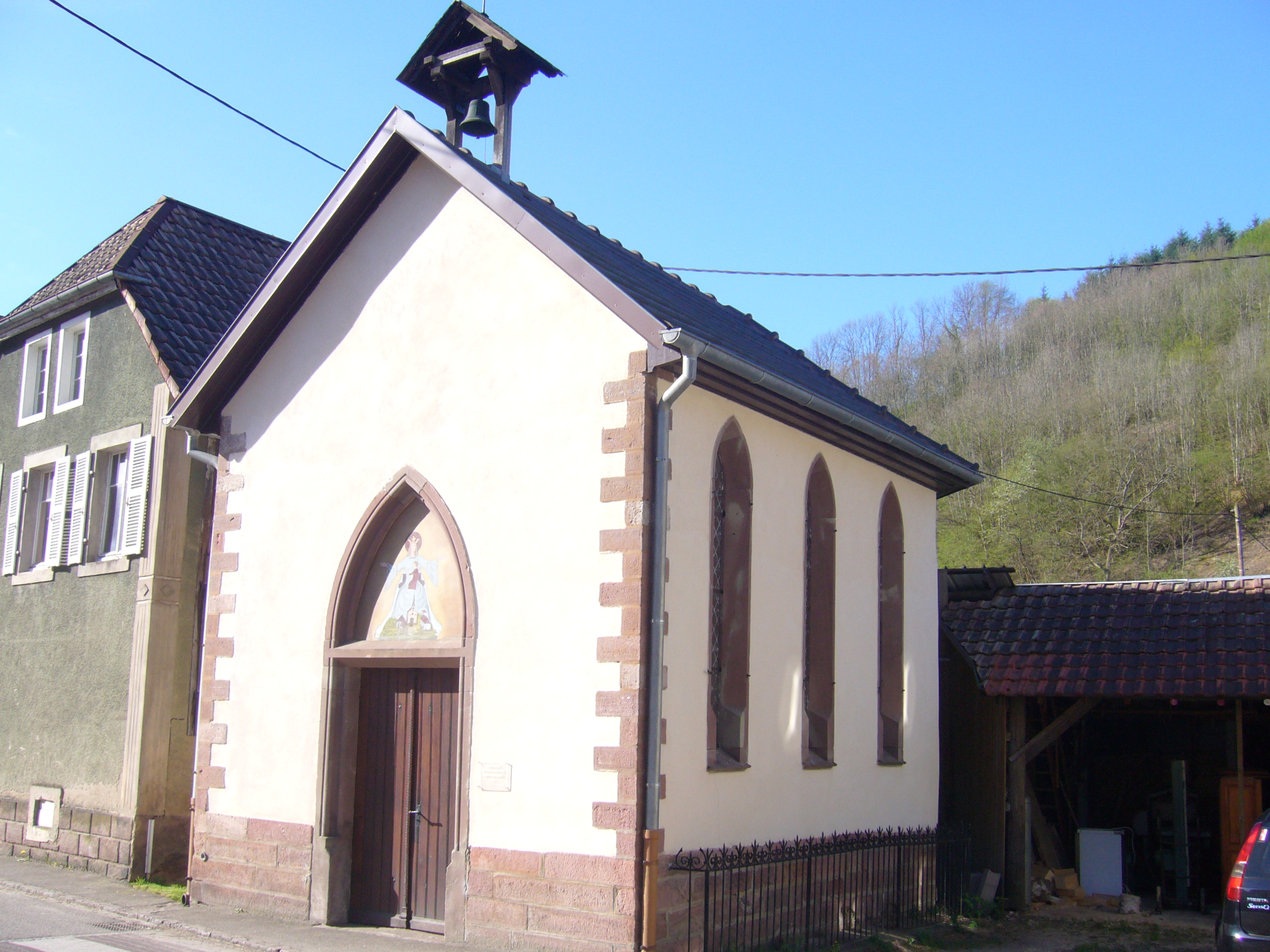 Chapelle Notre Dame du Bon Secours à la sortie du village